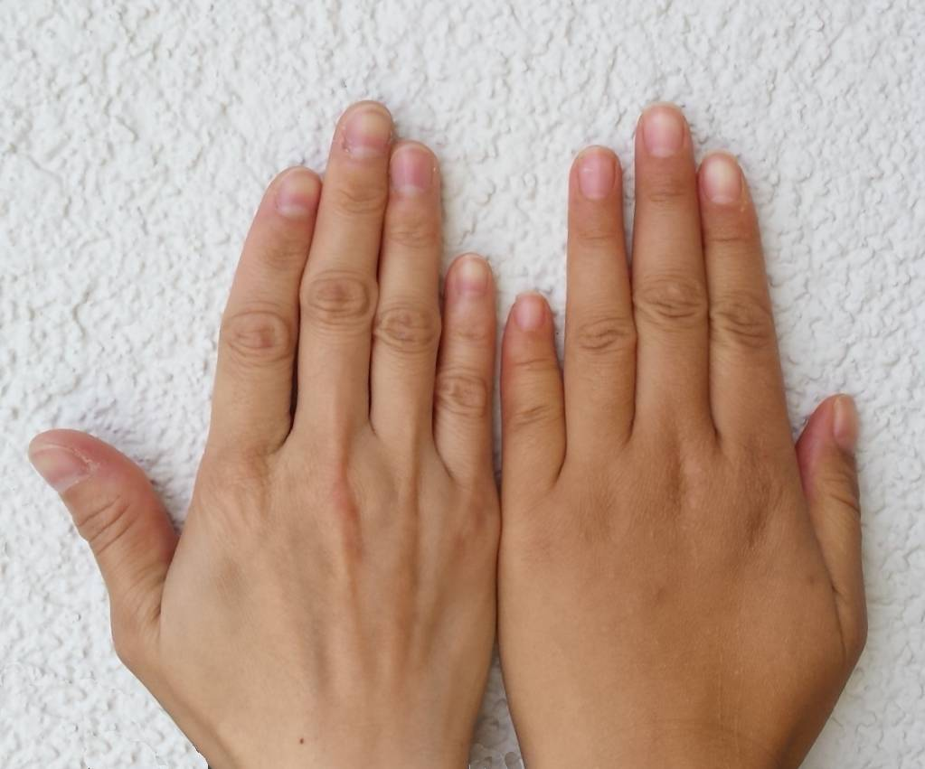 Auf der rechten Seite ist eine Hand mit Brachydaktylie Typ A3. Der kleine Finger ist verkürzt. Zum Vergleich links eine Hand mit normal großem kleinen Finger.